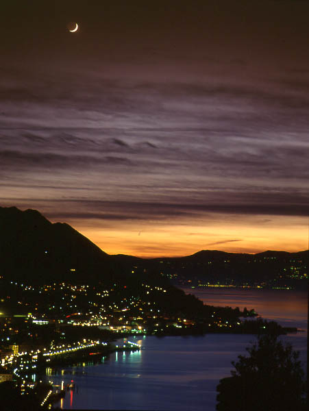 Luino-tramonto